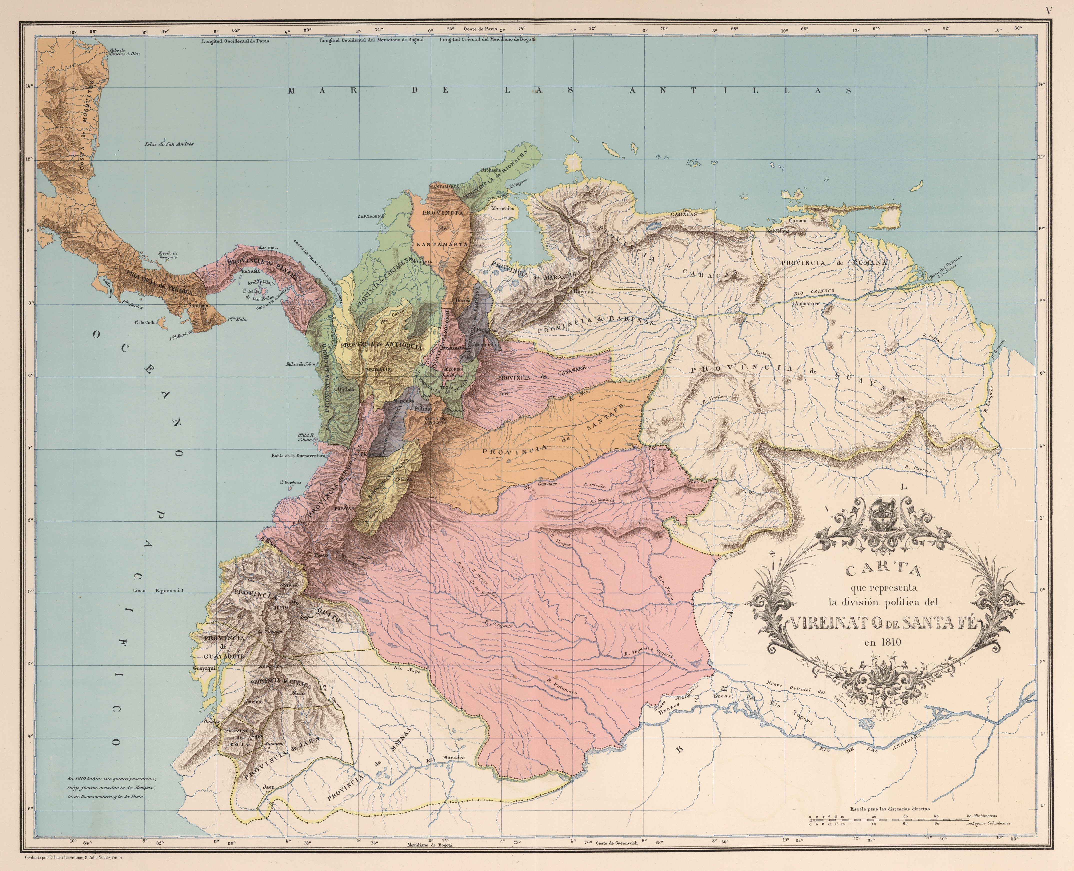 Carta que representa la división política del Virreinato de Santafé en 1810. Carta V del Atlas geográfico e histórico de la República de Colombia, 1890.